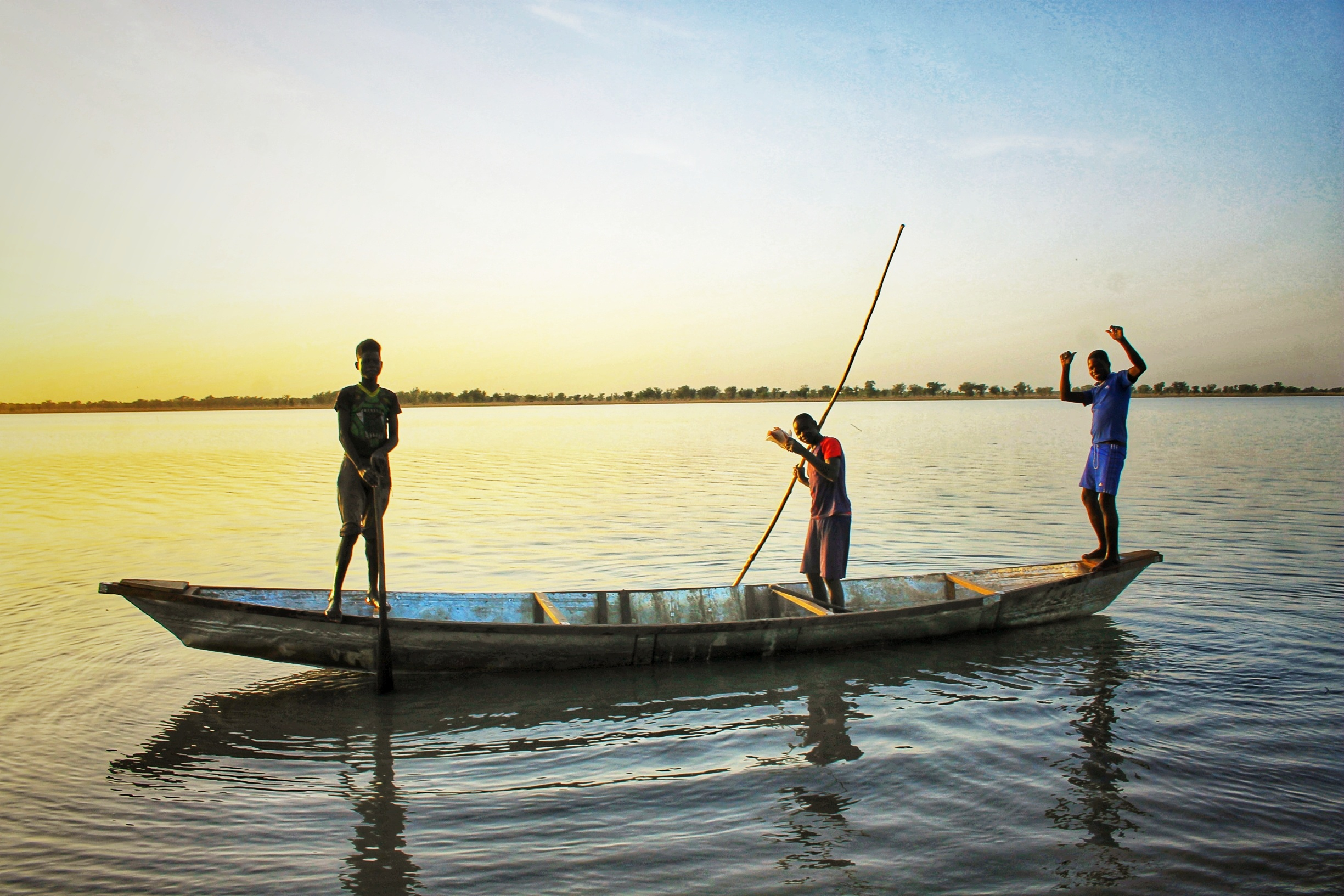 Les pêcheurs dans le lac de Guere situé dans le département du Mayo Danay à l'Extrême nord du Cameroun This is an image with the theme "Africa on the Move or Transport" from: Cameroon